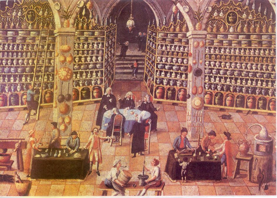 imagen de una botica barroca